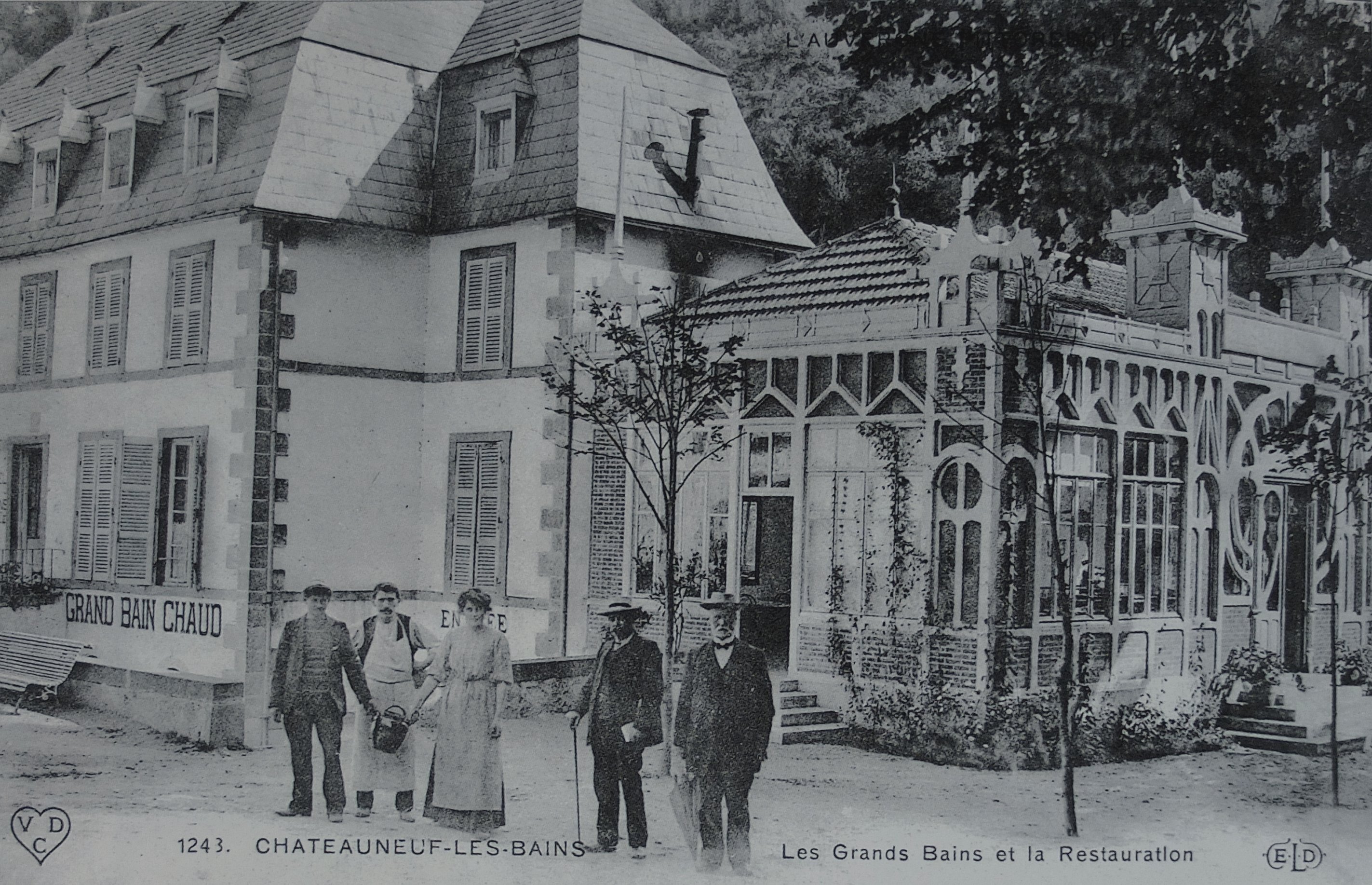 Châteauneuf-les-Bains, les grands-bains et la restauration, carte postale, éditeur Ernest Le Deley (E.L.D). vers 1910. Photographe inconnu.